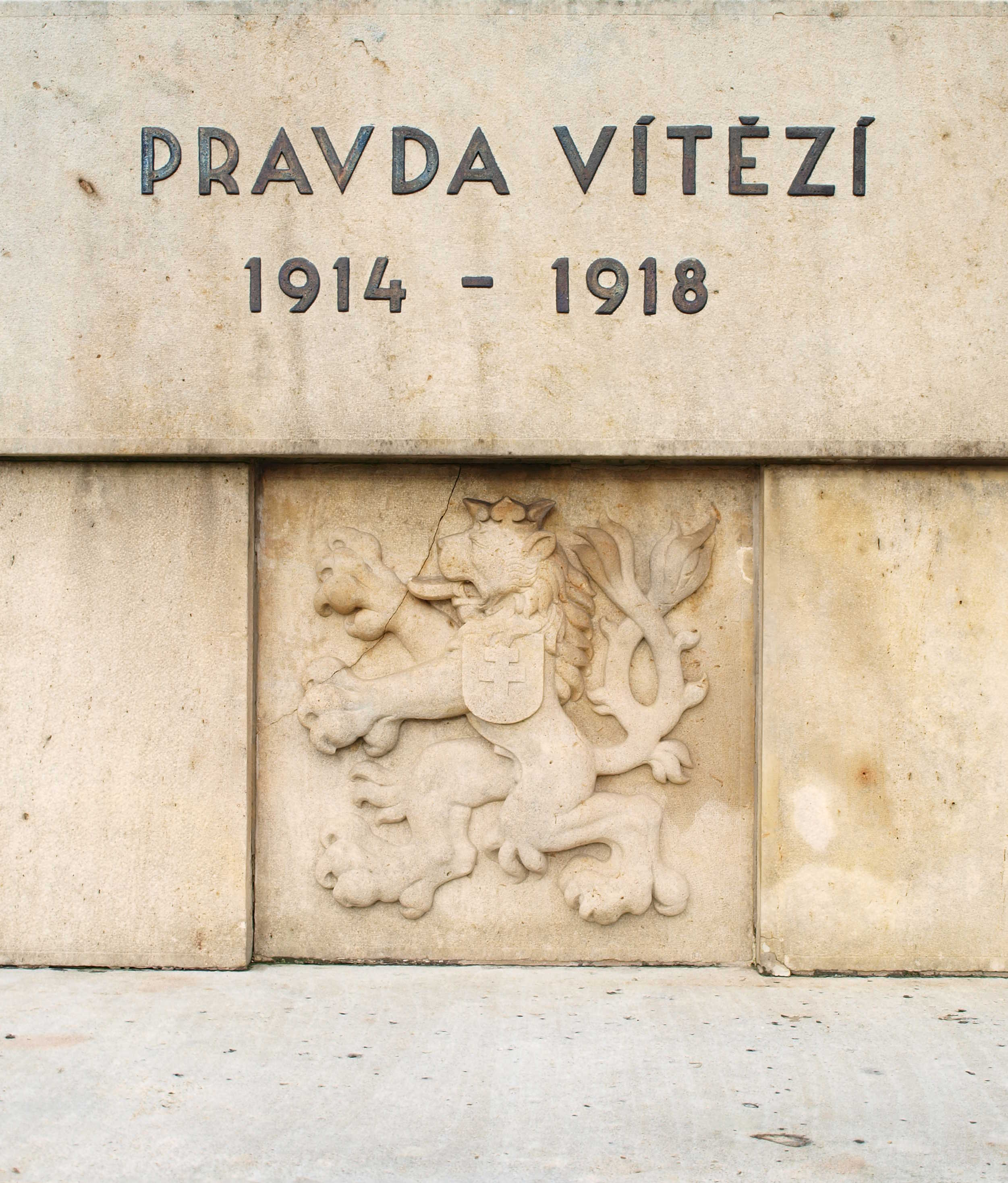 Chestres (commune de Vouziers, Ardennes, France) ; le mémorial tchécoslovaque de la Première Guerre mondiale. Détail.